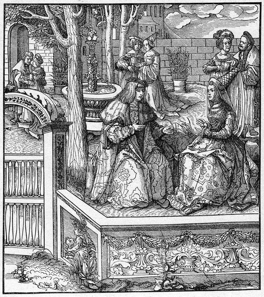 Maximilian I. und seine Gattin Maria von Burgund Nach einem Holzschnitt aus dem "Weißkunig" Buch-Scan von Wolpertinger - Lizenz: Public Domain Quelle: Müller-Baden, Emanuel (Hrsg.): Bibliothek des allgemeinen und praktischen Wissens, Bd. 2. - Berlin, Leipzig, Wien, Stuttgart: Deutsches Verlaghaus Bong & Co, 1904. - 1. Aufl. Leistungsschutzrechte abgelaufen.